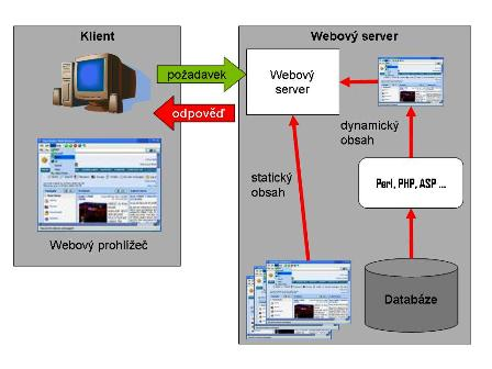 Schéma práce webového serveru s českými popisky.